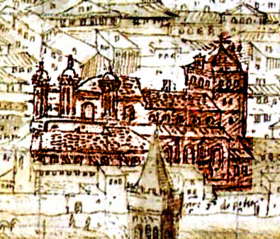 Detalle del templo mudéjar del Pilar de Zaragoza. Vista de Zaragoza, Anthonius van Der Wingaerde, 1563.